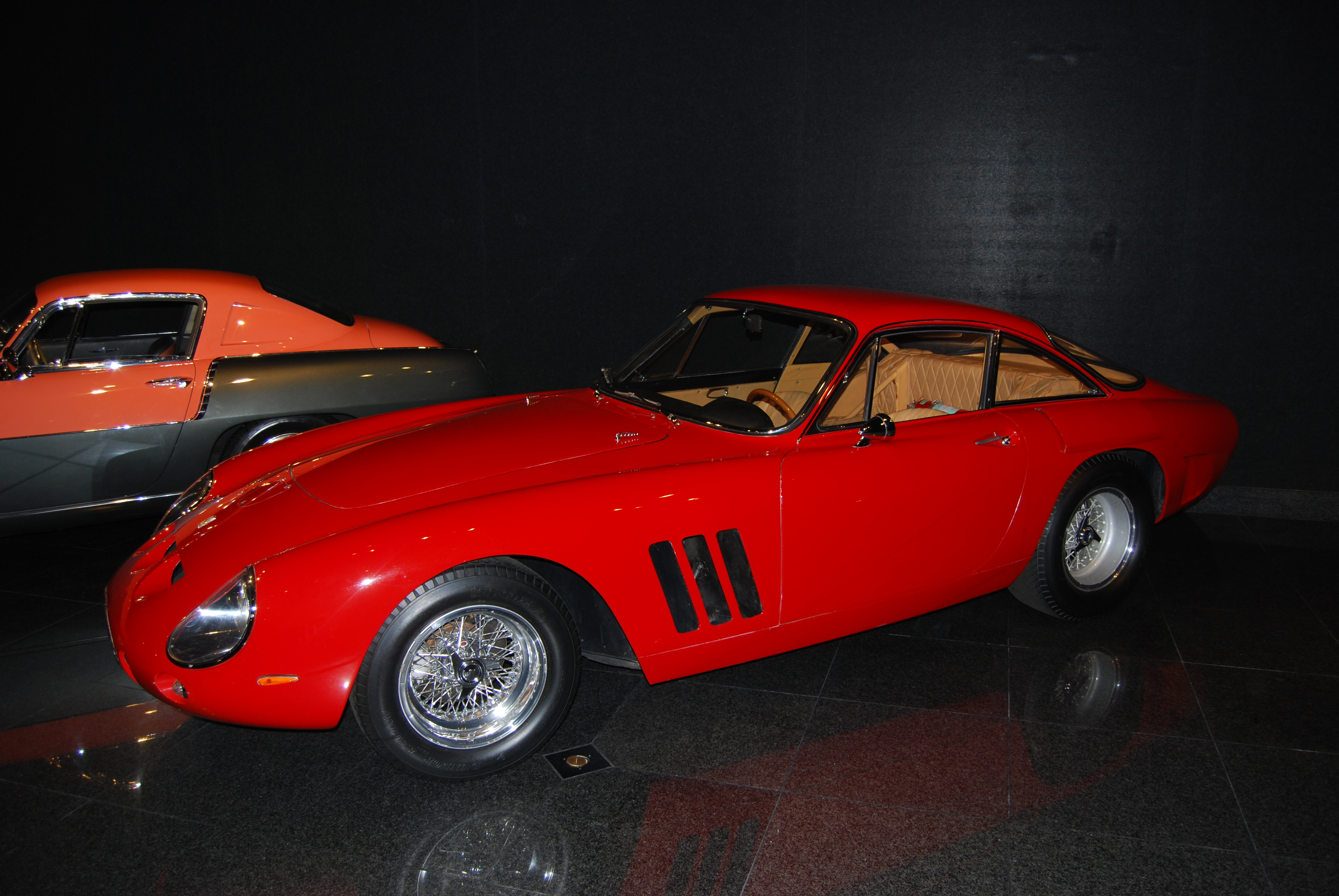 Ferrari 330 Le Mans Berlinetta del 1962 carrozzata Scaglietti, conservata nel Blackhawk Automotive Museum di Danville, California. 4 esemplari costruiti